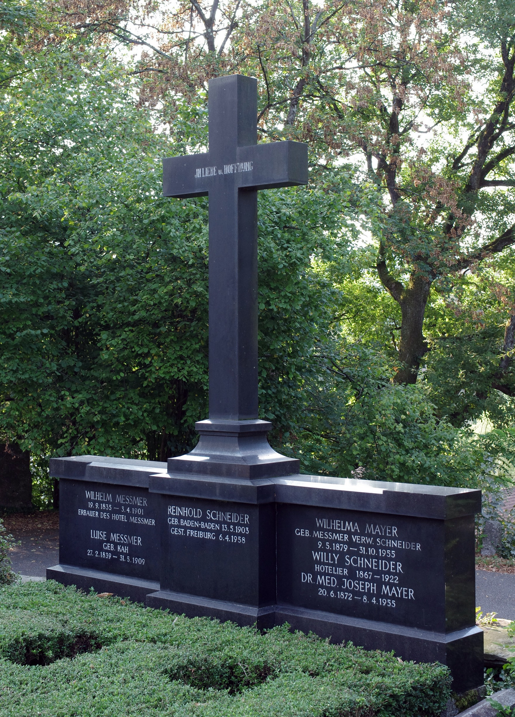 Grab Reinhold Schneider und Familie auf dem Hauptfriedhof Baden-Baden